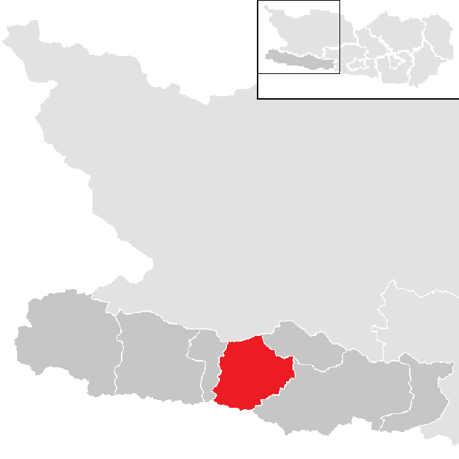 Bezirk Hermagor